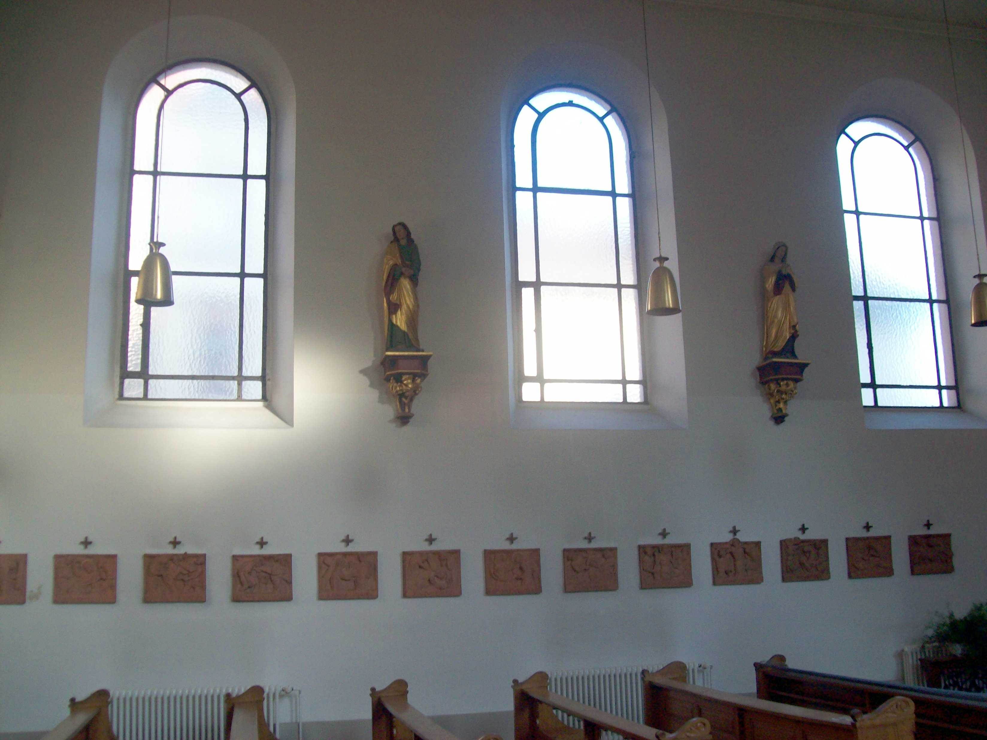 Spitalkirche St. Katharina am ehemaligen Städt. Krankenhaus Südwand